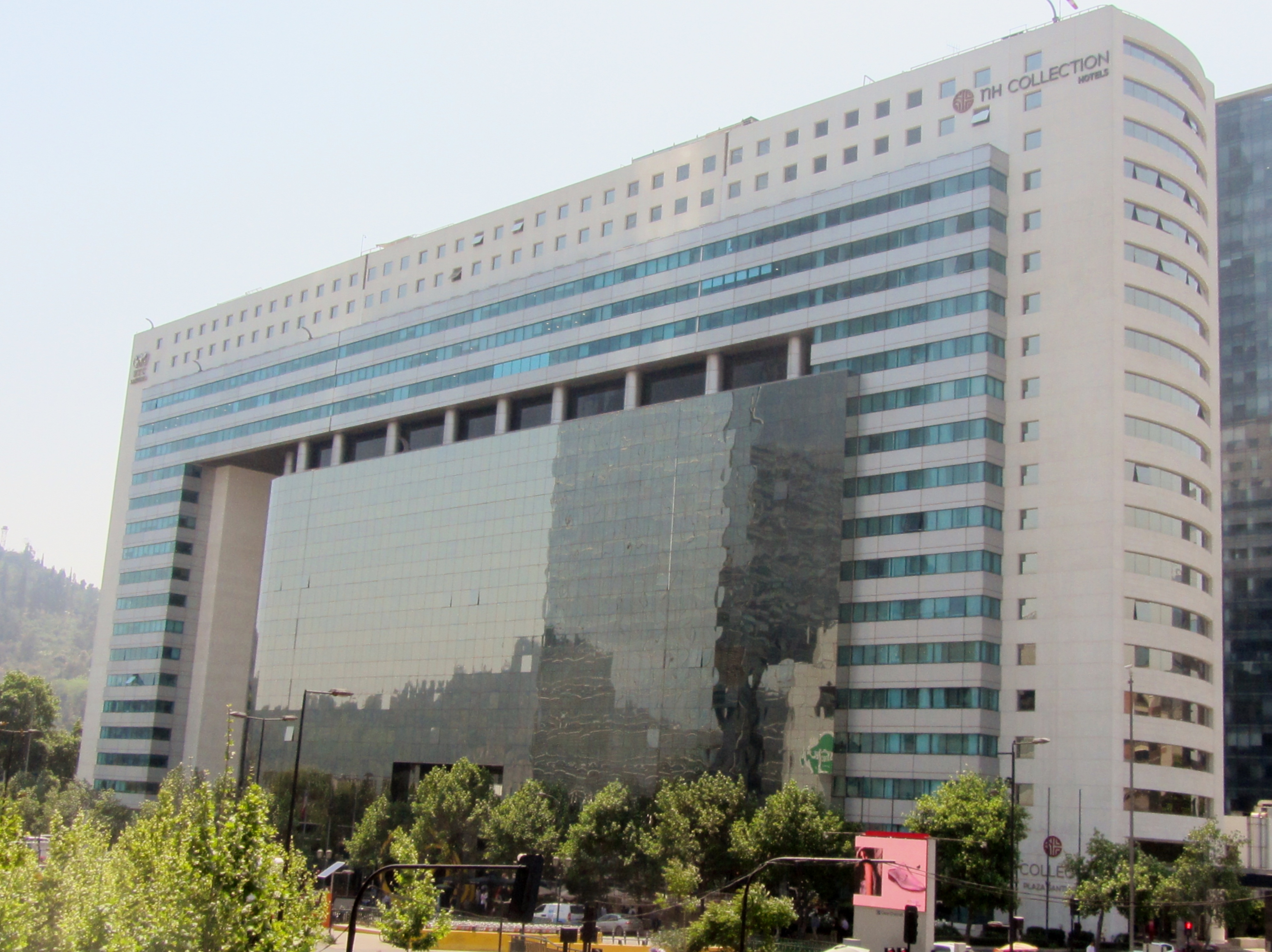 Edificio World Trade Center Santiago (WTCS), ubicado en avenida Nueva Tajamar 455, Las Condes, fue terminado en 1995 y su diseño estuvo a cargo de Daniel Álamos y Sergio Amunátegui, de la oficina Amunátegui Barreau Arquitectos Asociados A.I.A (con la colaboración de Carmen Barreau, Jorge Sánchez, Gonzalo Cortés). El terreno es de 8 474 m² y la superficie construida de 94 500 m², propiedad de la Inmobiliaria Nueva de Lyon